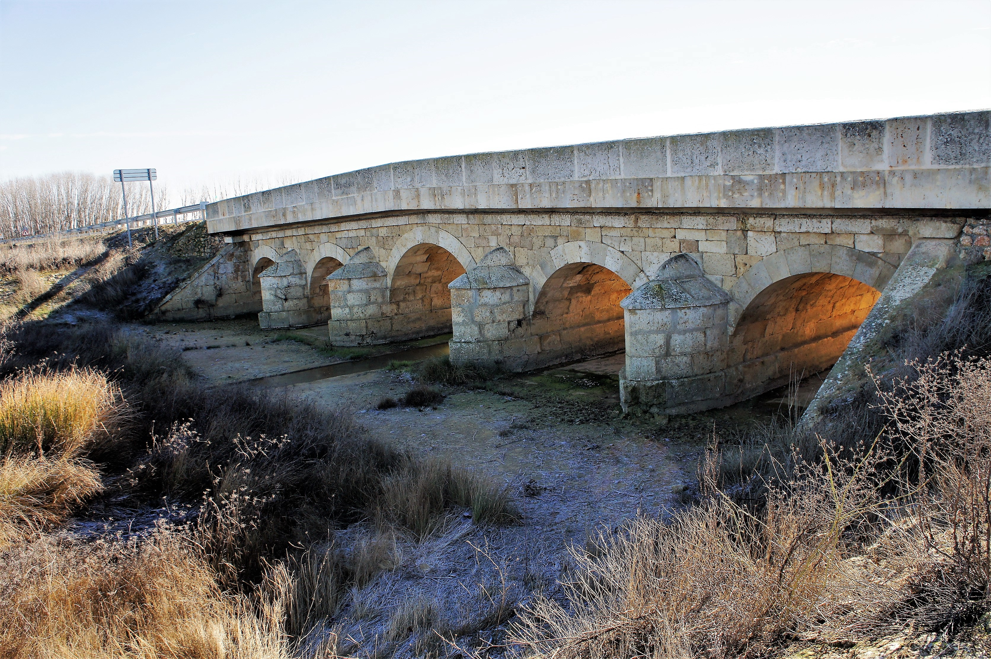 Becerril de Campos. Palencia